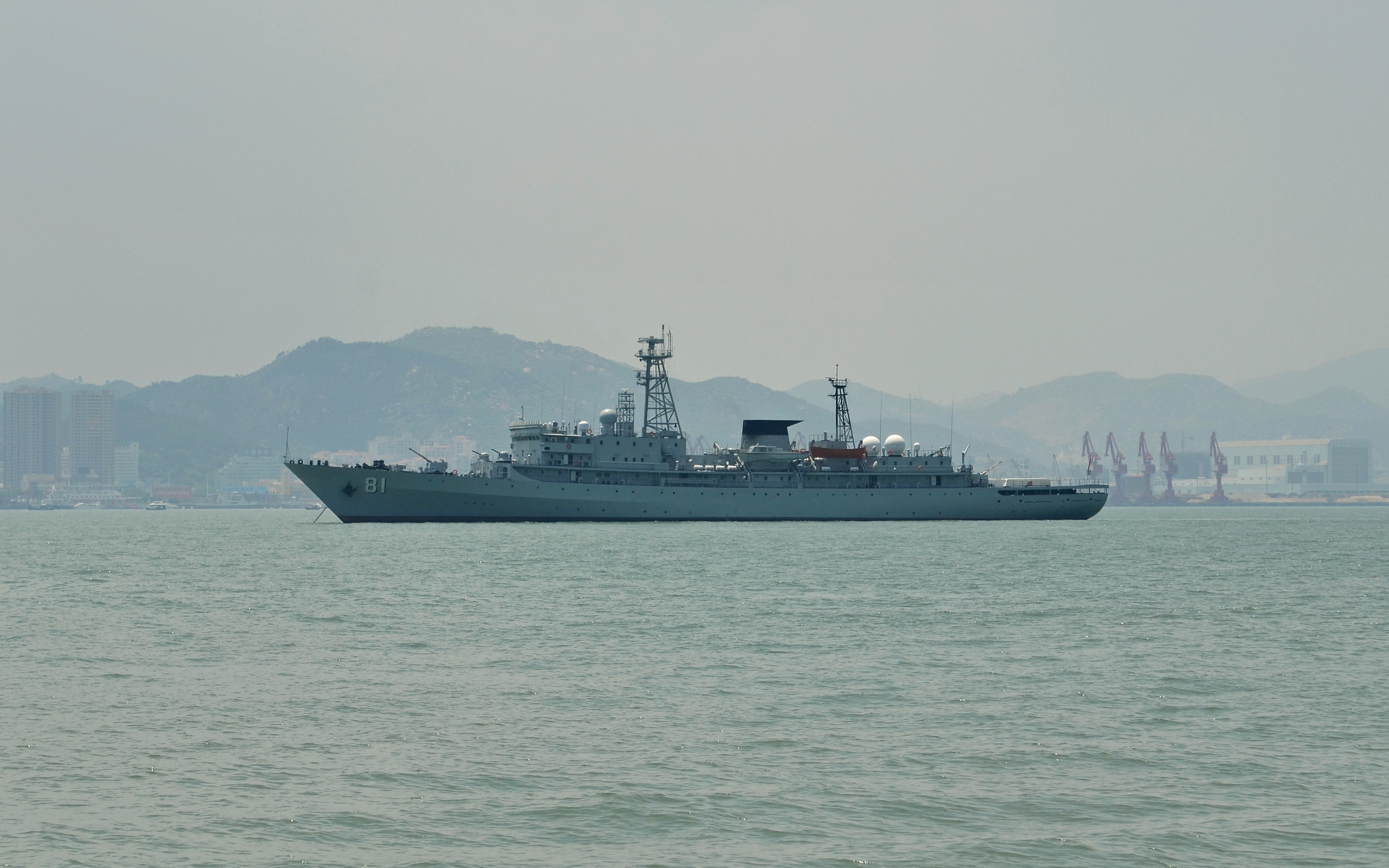 中国海军"郑和"号远洋航海训练舰, 舷号81